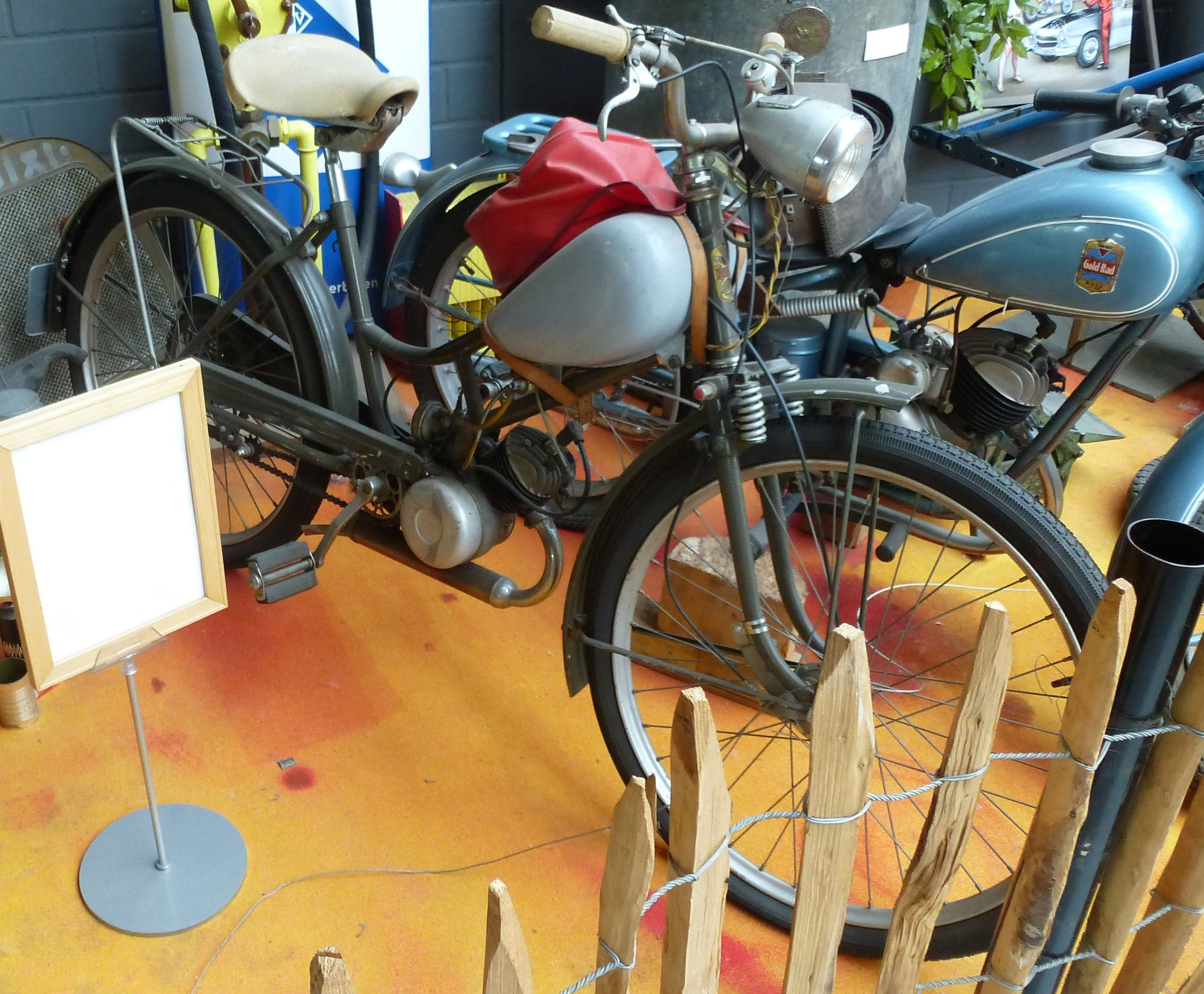 Moped von Gold-Rad aus den 1950er Jahren